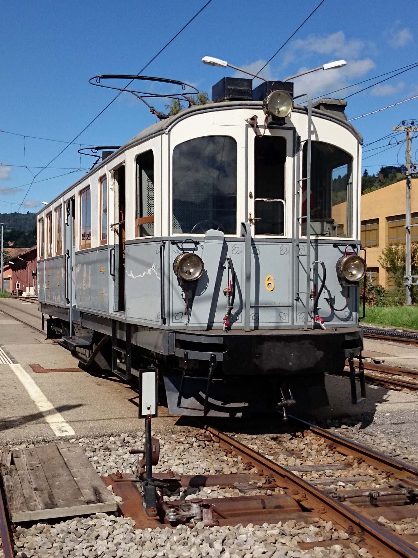 Historischer meterspur Motorwagen BCFeh 4/4 6 mit gemischtem Adhäsions- und Zahnradantrieb der ehemaligen Monthey–Champéry–Morgins-Bahn (MCM), heute Transports Publics du Chablais (TPC), bei der Museumsbahn Blonay–Chamby im Bahnhof Blonay